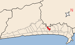 Bairro de Caieiras, em Praia Grande.